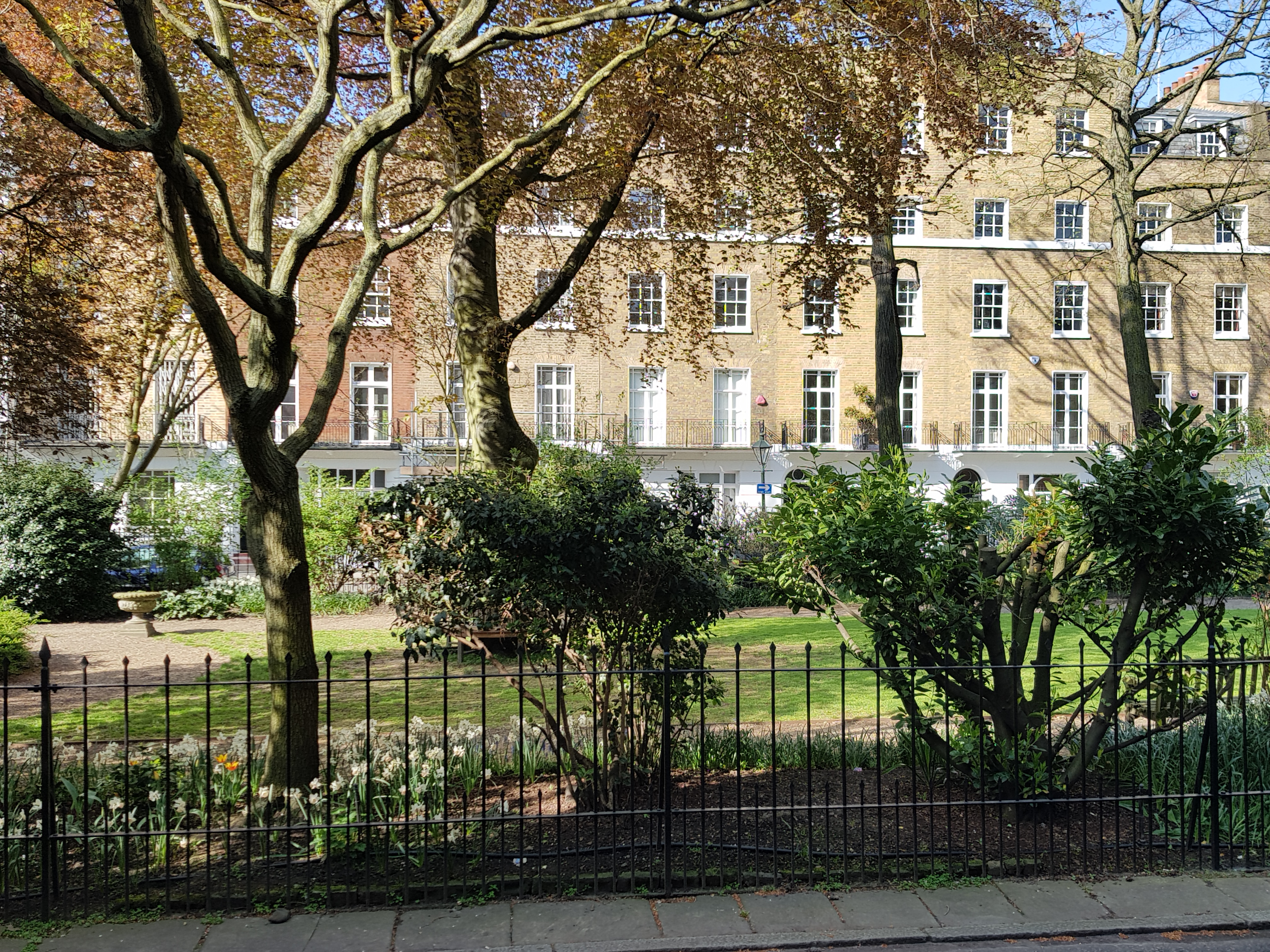 Jardin de Brompton Square, Londres.